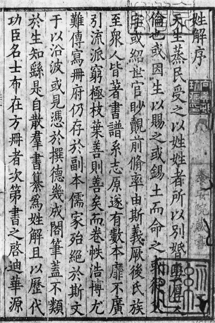 『姓解』は伝本の稀な北宋刊本の中の一つで、中国にも所在を見ない孤本です。中国古来の姓氏2568氏を、字体によって170部門に分けて配列し、姓の起源・著名人・掲載書をあげ、発音をしるす字書となっています。この『姓解』は宋から高麗王府を経て、日本に舶載されたものとされます。後陽成天皇の侍医であった曲直瀬正琳まなせしょうりん（1565―1611）の旧蔵で、昌平黌に学び全権公使としてパリに駐在した向山黄村むこうやまこうそん（1826―1897）の手を経て国立国会図書館に寄贈されました。